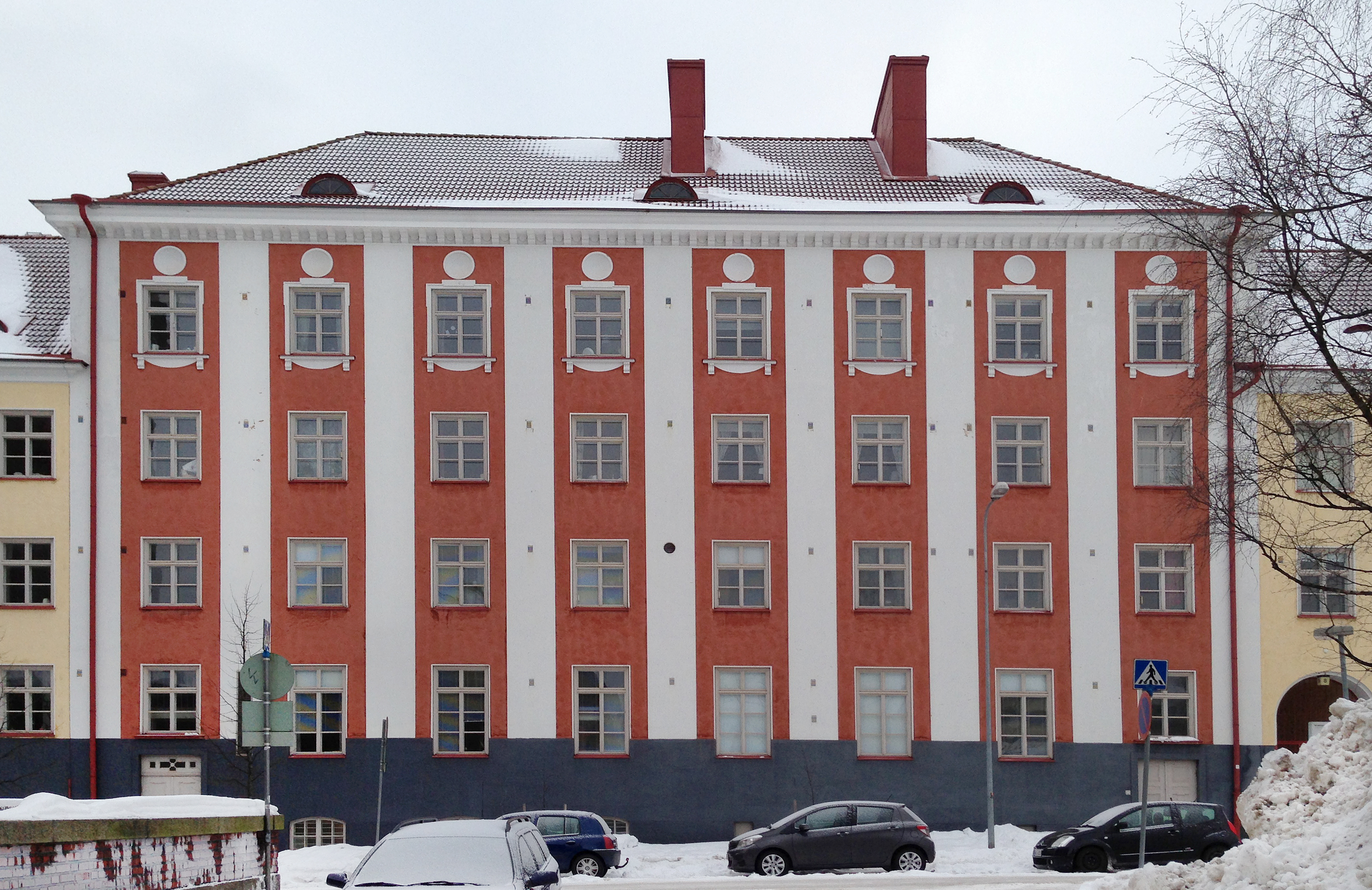 Helsingin kaupunginosassa 22 Vallilassa, korttelissa 555 sijaitsevat arkkitehti Armas Lindgrenin piirtämät asuinrakennukset.